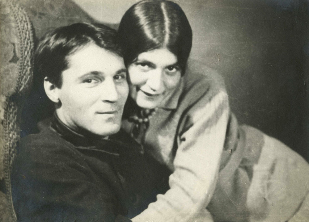 Супруги Спасские. Фото из коллекции музея-квартиры А. Белого в Москве.